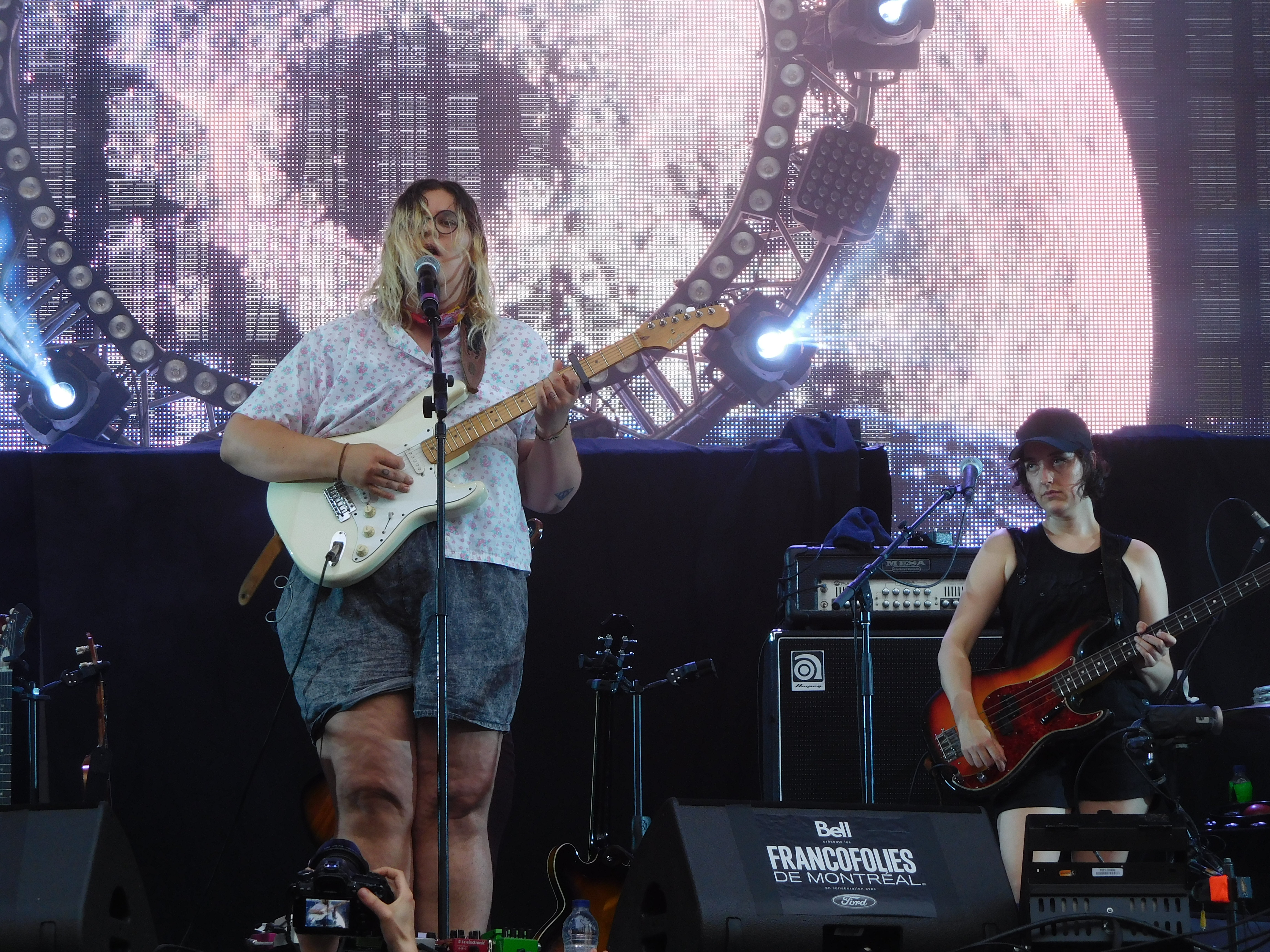 Spectacle de Louve, à la place des Festivals, le 18 juin 2017, aux FrancoFolies de Montréal